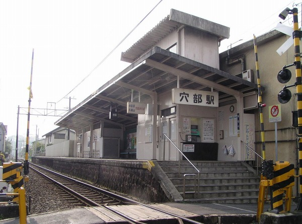 Anabe Station, on the Izuhakone Daiyūzan Line, Odawara, Kanagawa 穴部駅